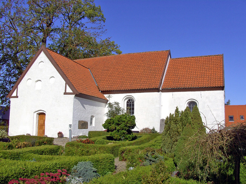 fra syd